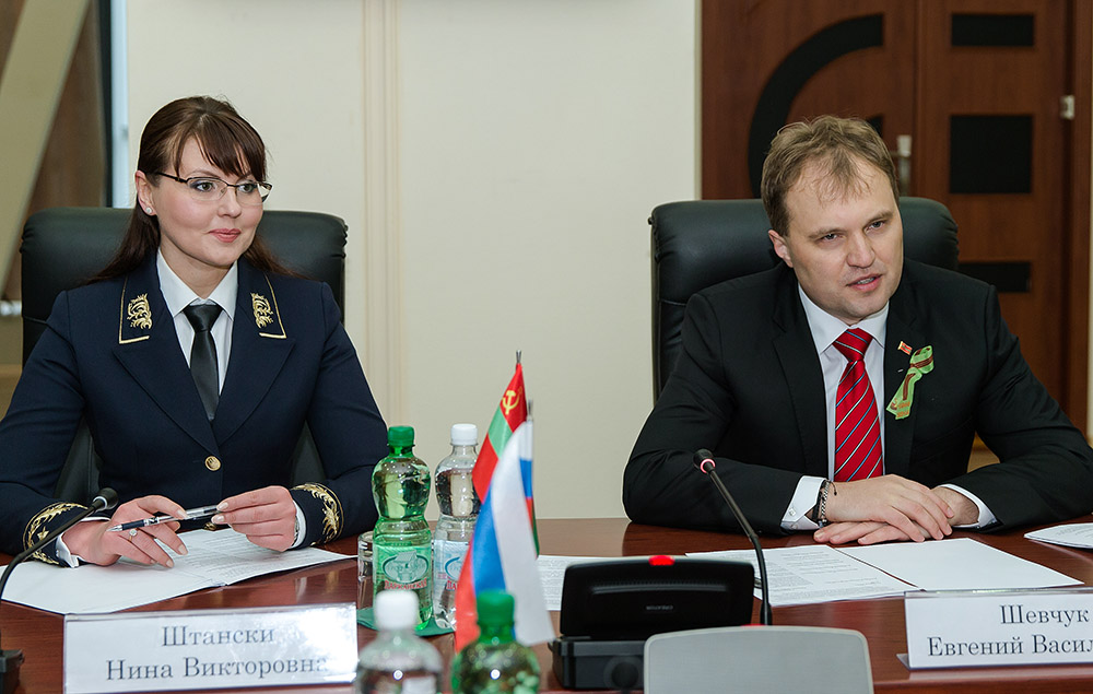 Нина Штански и Евгений Шевчук